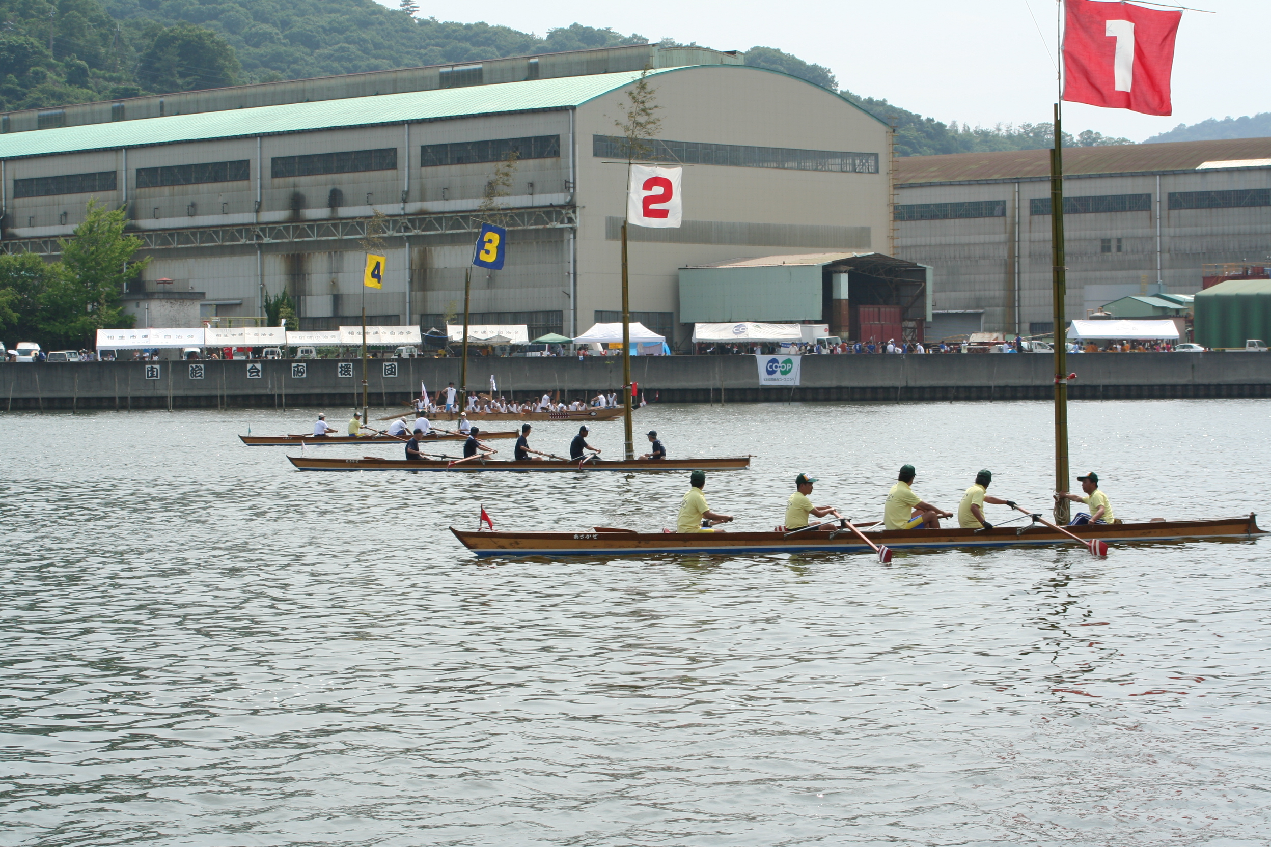 相生ペーロン祭。兵庫県相生市にて毎年開催される祭。2009年7月11･12日の2日間にかけて行なわれた祭の2日目の様子。 スタート地点に並んだボート。